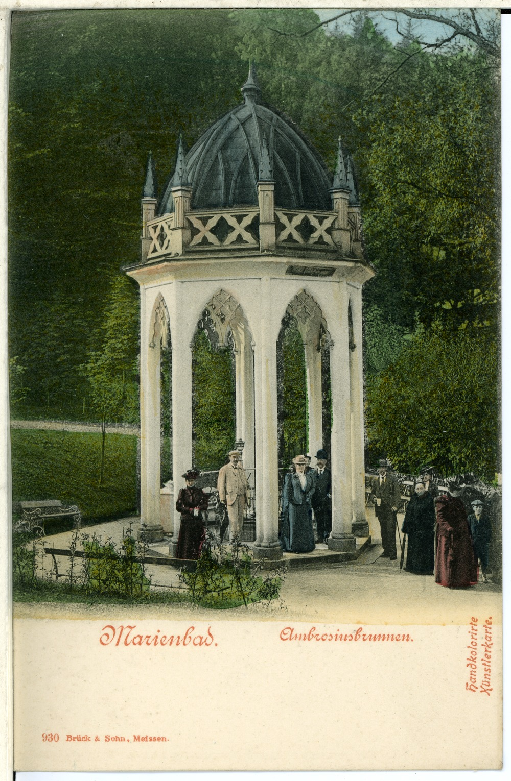 Marienbad; Ambrosiusbrunnen This postcard is from publisher Brück & Sohn in Meißen ( postcard has a unique number 00930 and is available in a higher resolution at the publisher. This images was uploaded in a cooperation project between Wikipedians and the publisher.